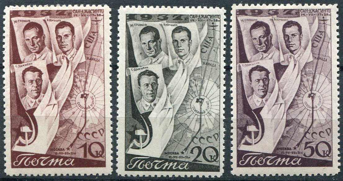 Почтовые марки - Данилин, Громов, Юмашев - Герои Советского Союза